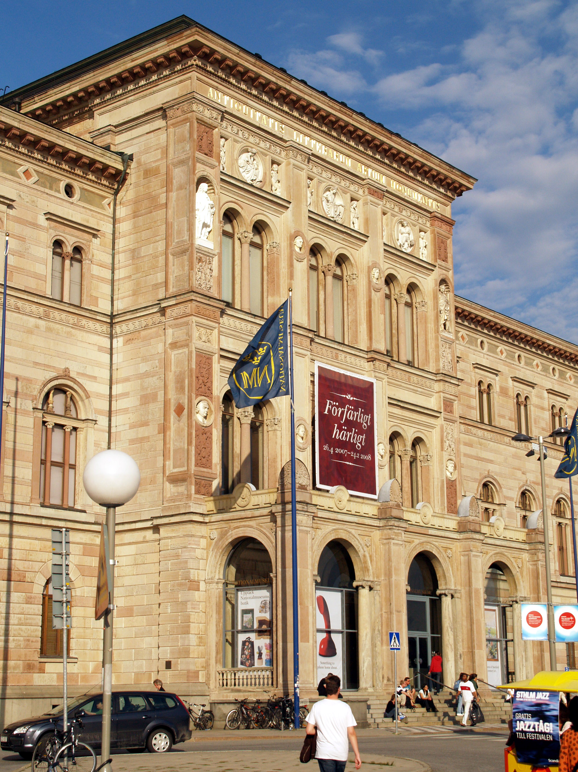 Schwedisches Nationalmuseum, Stockholm, Schweden